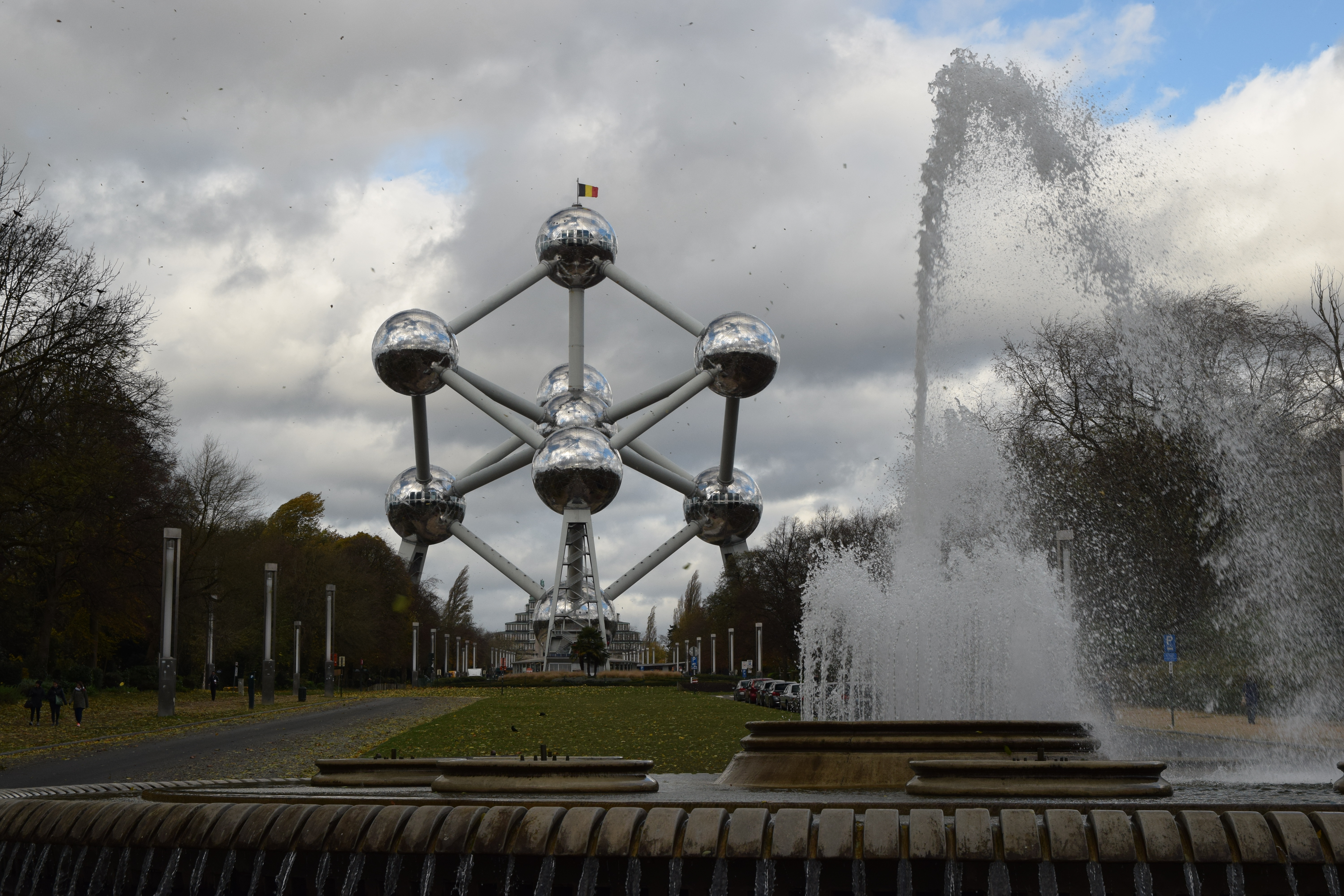 Heizelvlakte (Eeuwfeestlaan) met de fontein, het atomium en de expo 5 op de achtergrond